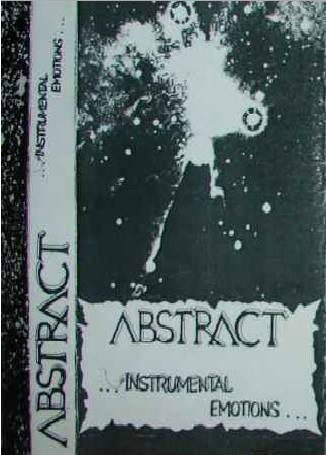 Predná strana obalu prvého demo albumu kapely Abstract z roku 1996 s názvom Instrumental Emotions .